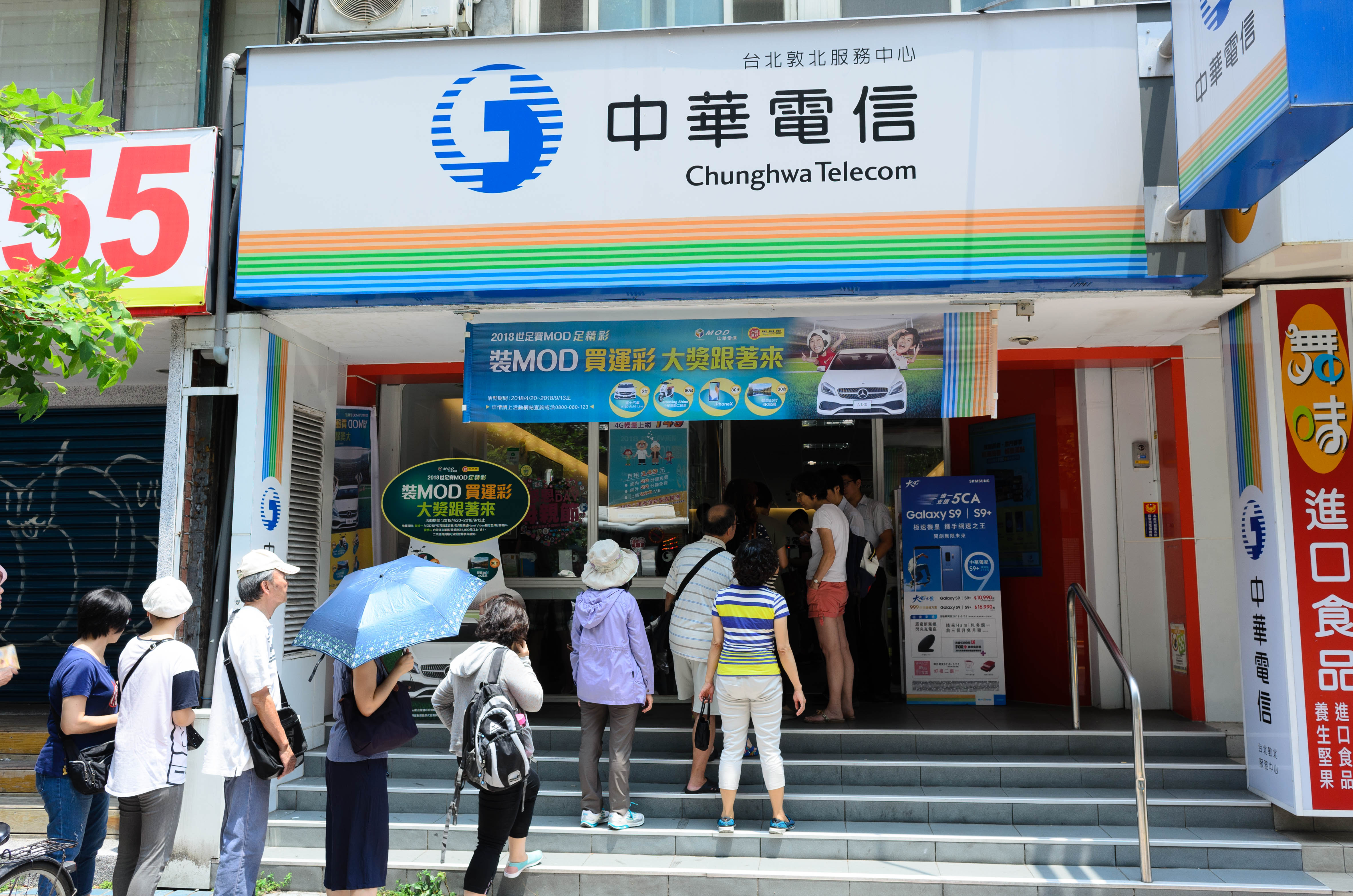 4G上網499元吃到飽優惠活動第六天，中華電信台北敦北服務中心前等候領取申辦4G上網499元優惠活動號碼牌的民眾。